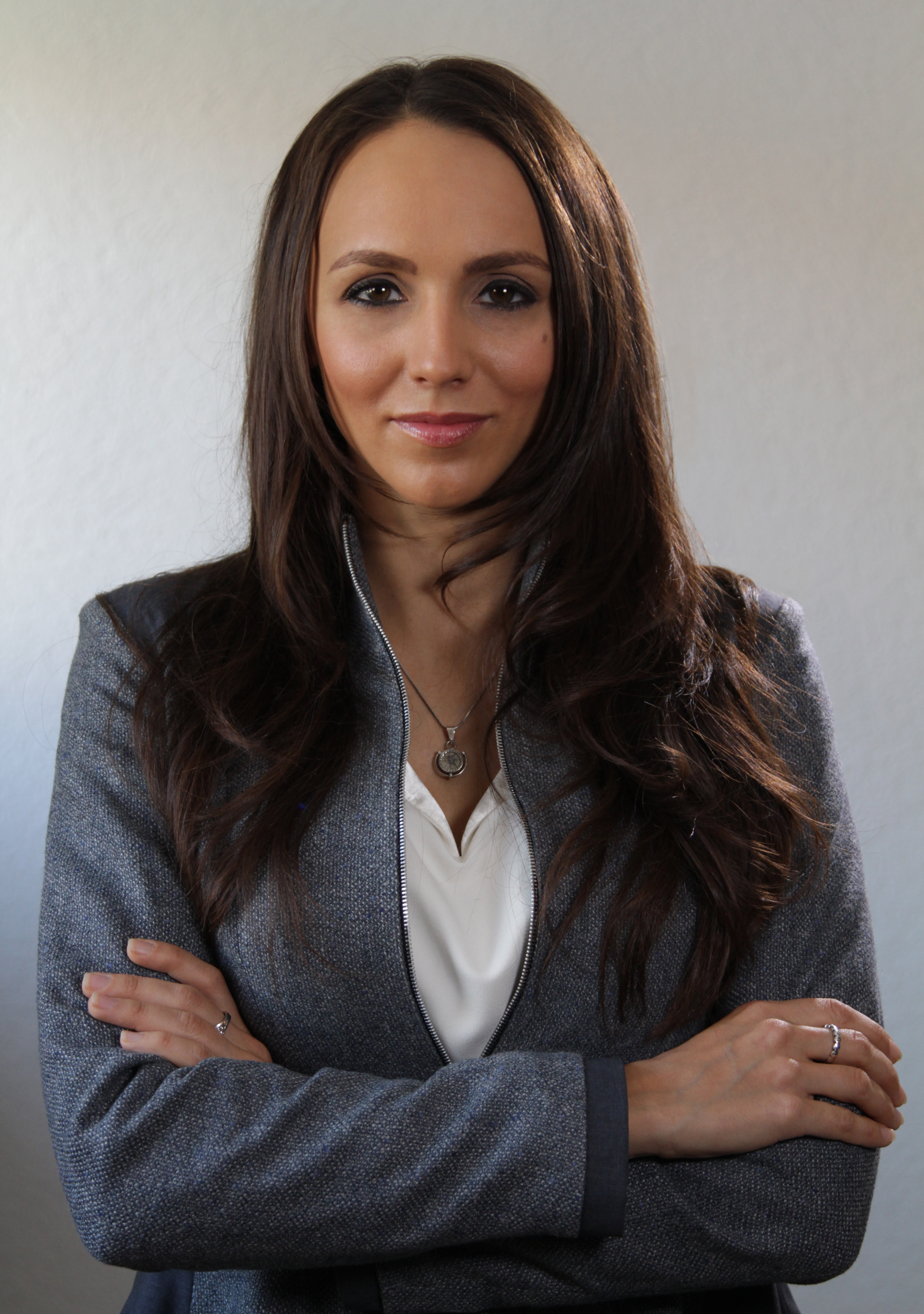 Dr. Molnár Andrea profilképe (1025 Budapest, Szépvölgyi út 52., Ovi-Sport Közhasznú Alapítvány)